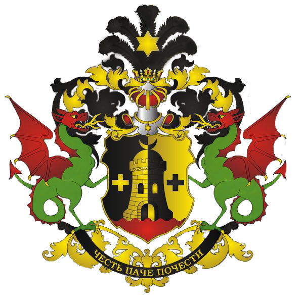 Герб Григорія Маразлі: Був дан Григорію Маразлі 9 серпня 1879 року